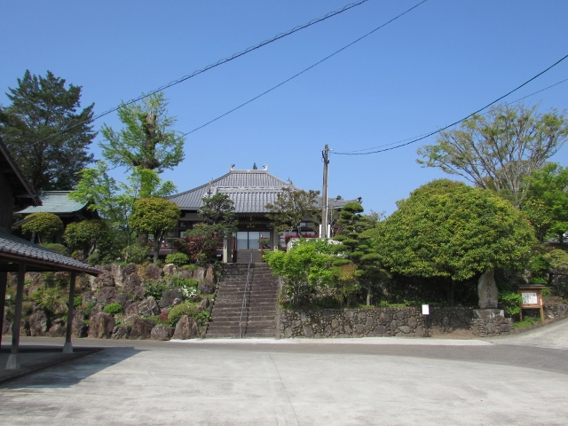 初夏の様子